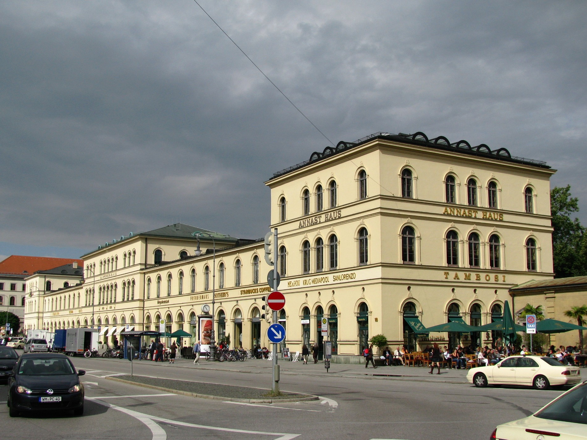 Das Bazargebäude in München, Odeonsplatz 6–18